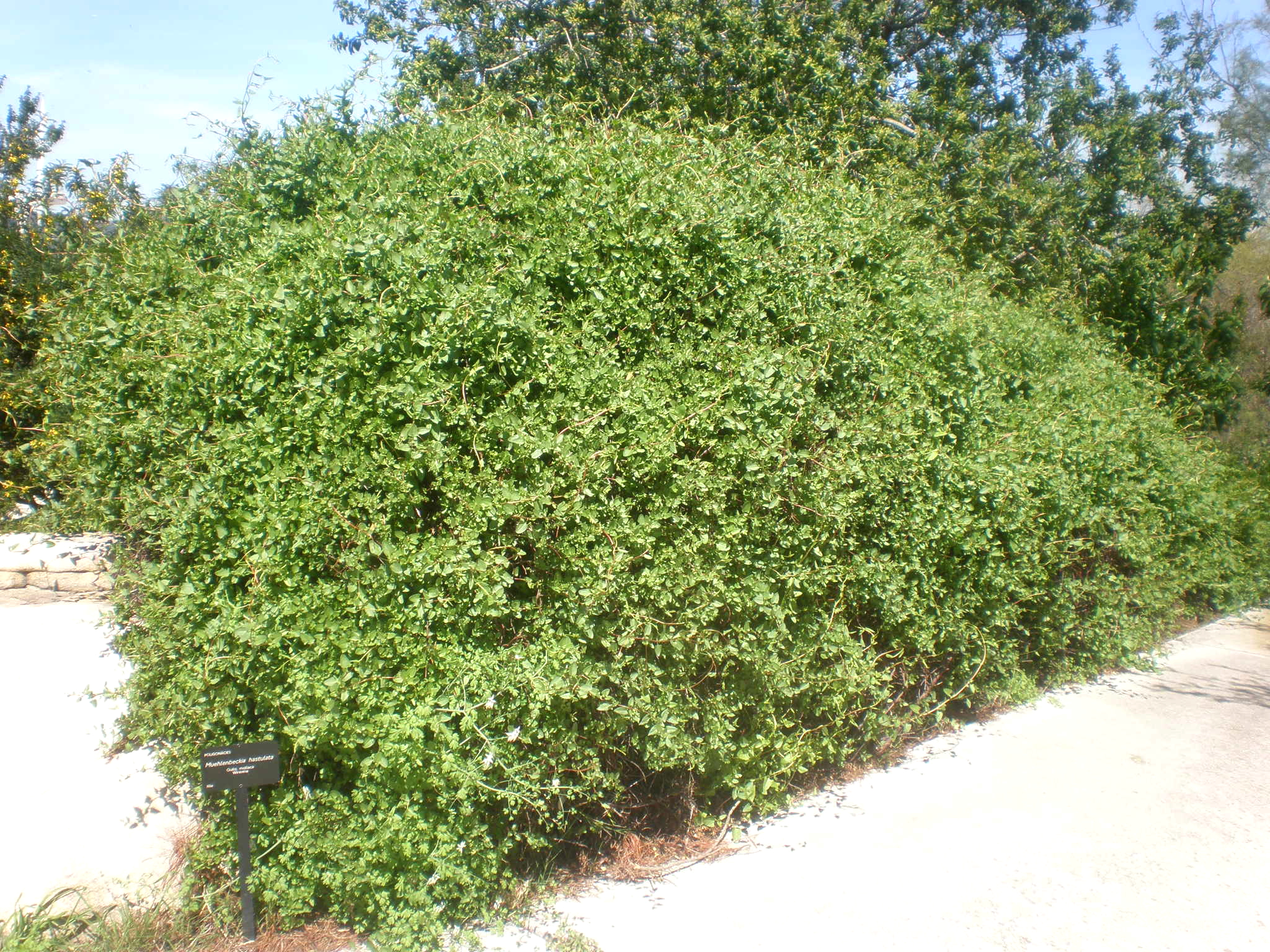 Jardín Botánico de Barcelona.